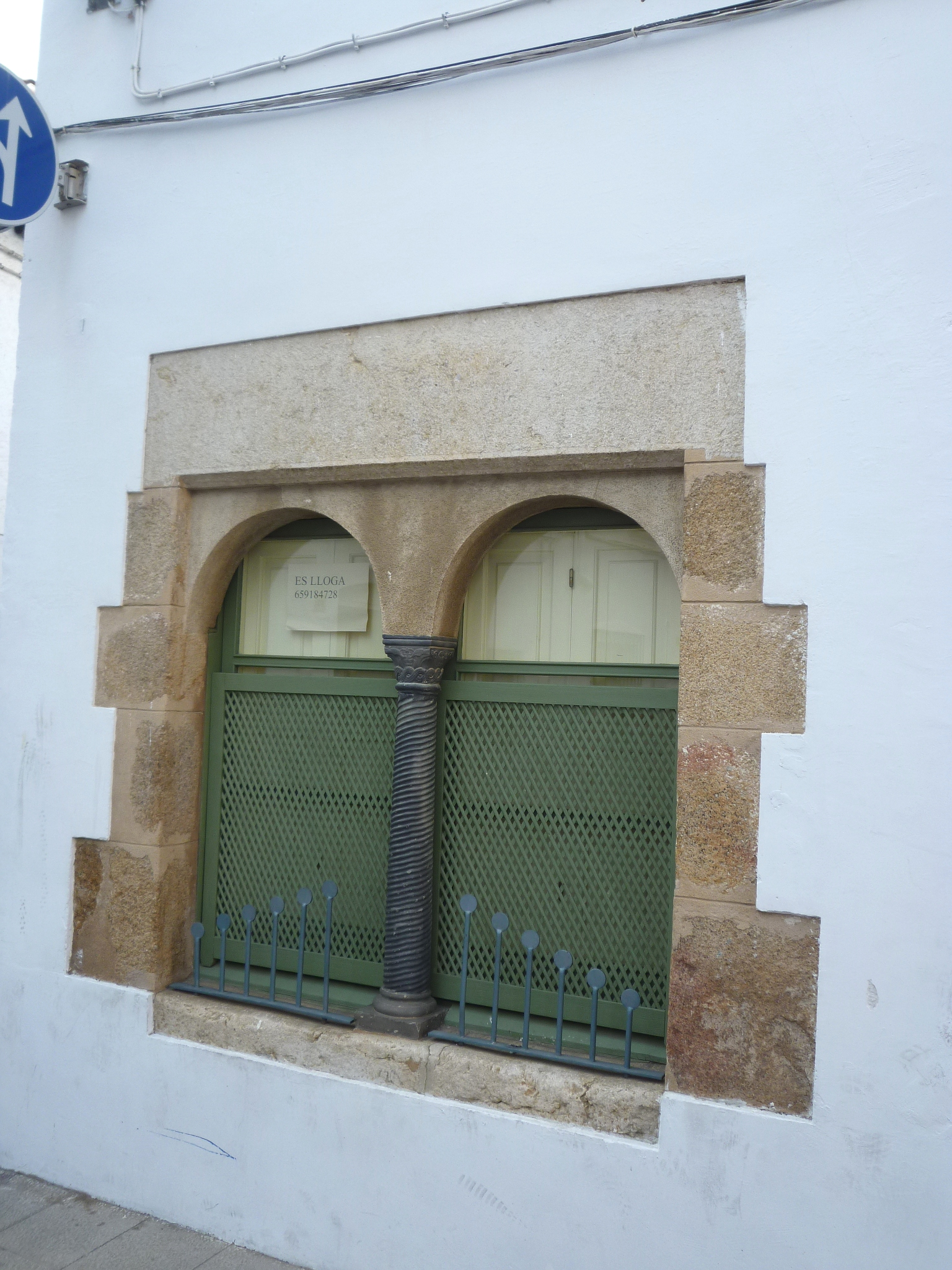 Habitatge al carrer Sant Miquel, 28 (Tossa de Mar): finestra geminada